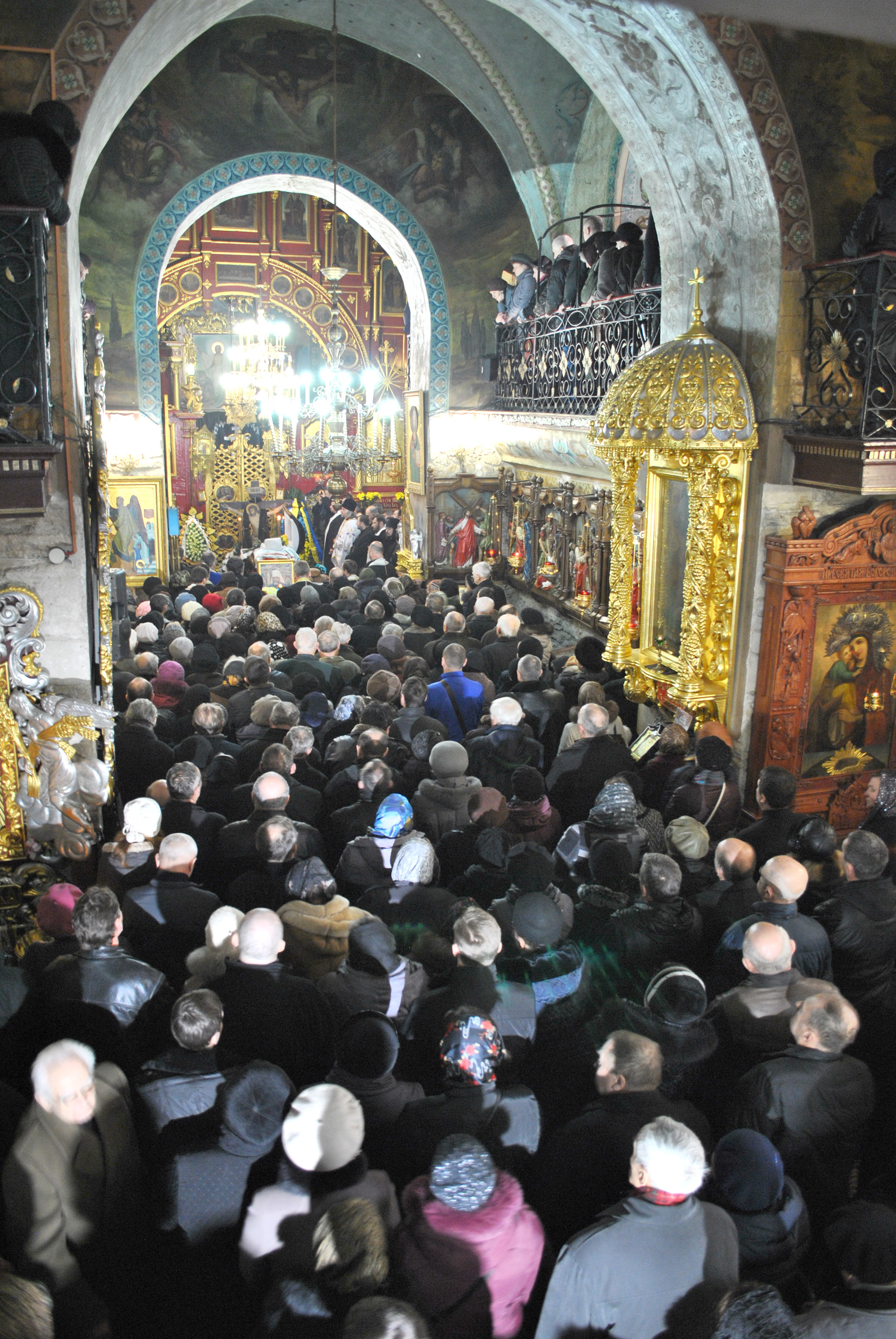 Похорон предстоятеля Української автокефальної православної церкви, Митрополита Київського і всієї України Мефодія в церкві Різдва Христового (м. Тернопіль).